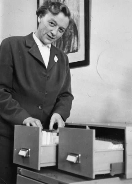 portrett, kvinne, skøyteløper, informasjonsmedarbeider i Oslo kommune, kristelig ungdomsleder, stående halvfigur, katalogskuffer.